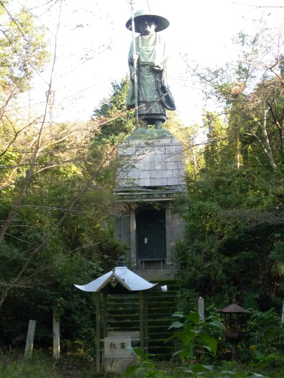 四国88ヶ所と同じ御利益があるとされています